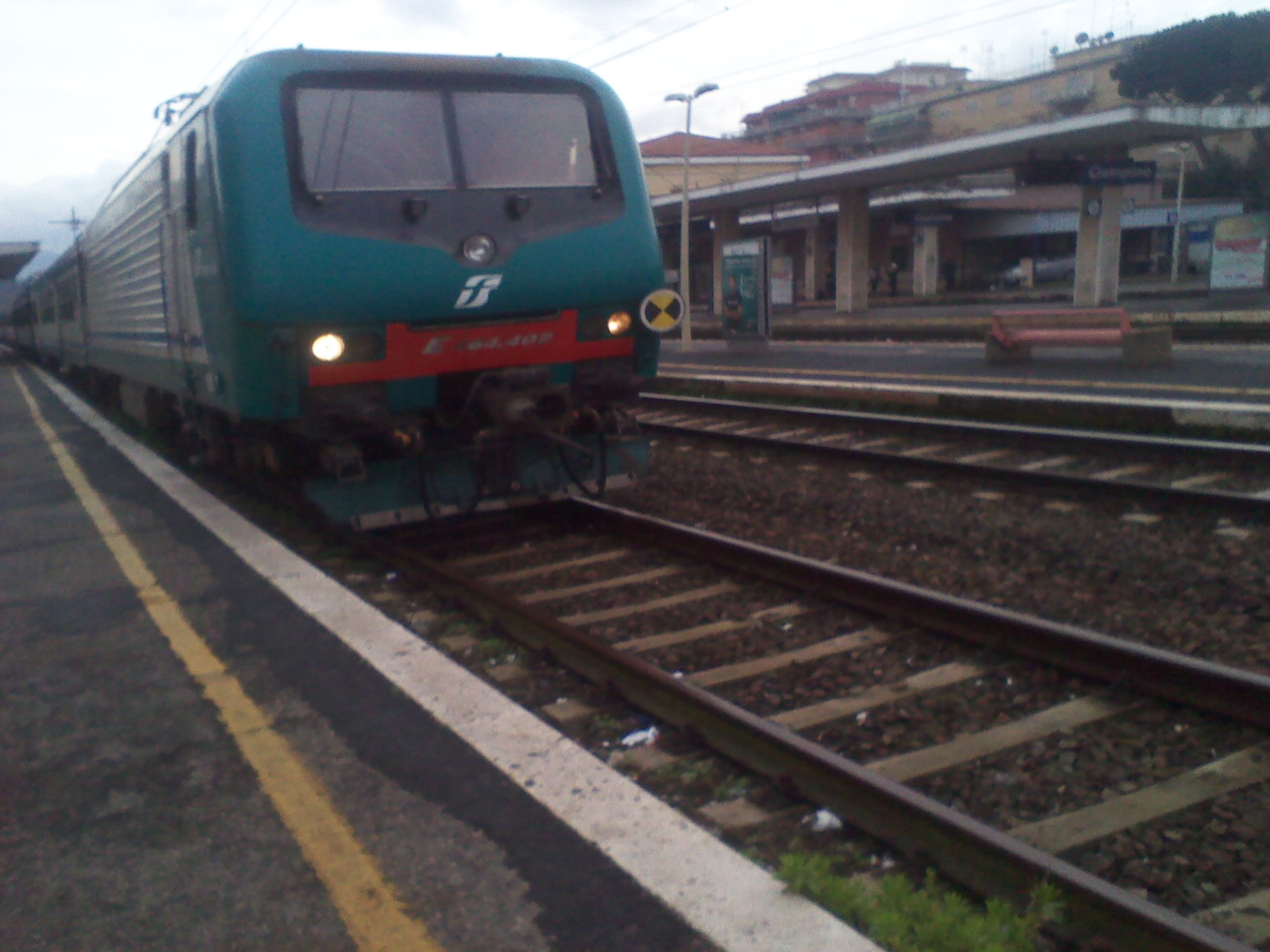 Regionale in doppia trazione con E.464 402 in testa in sosta sul binario 6 (usato per l'accantonamento del materiale rotabile).